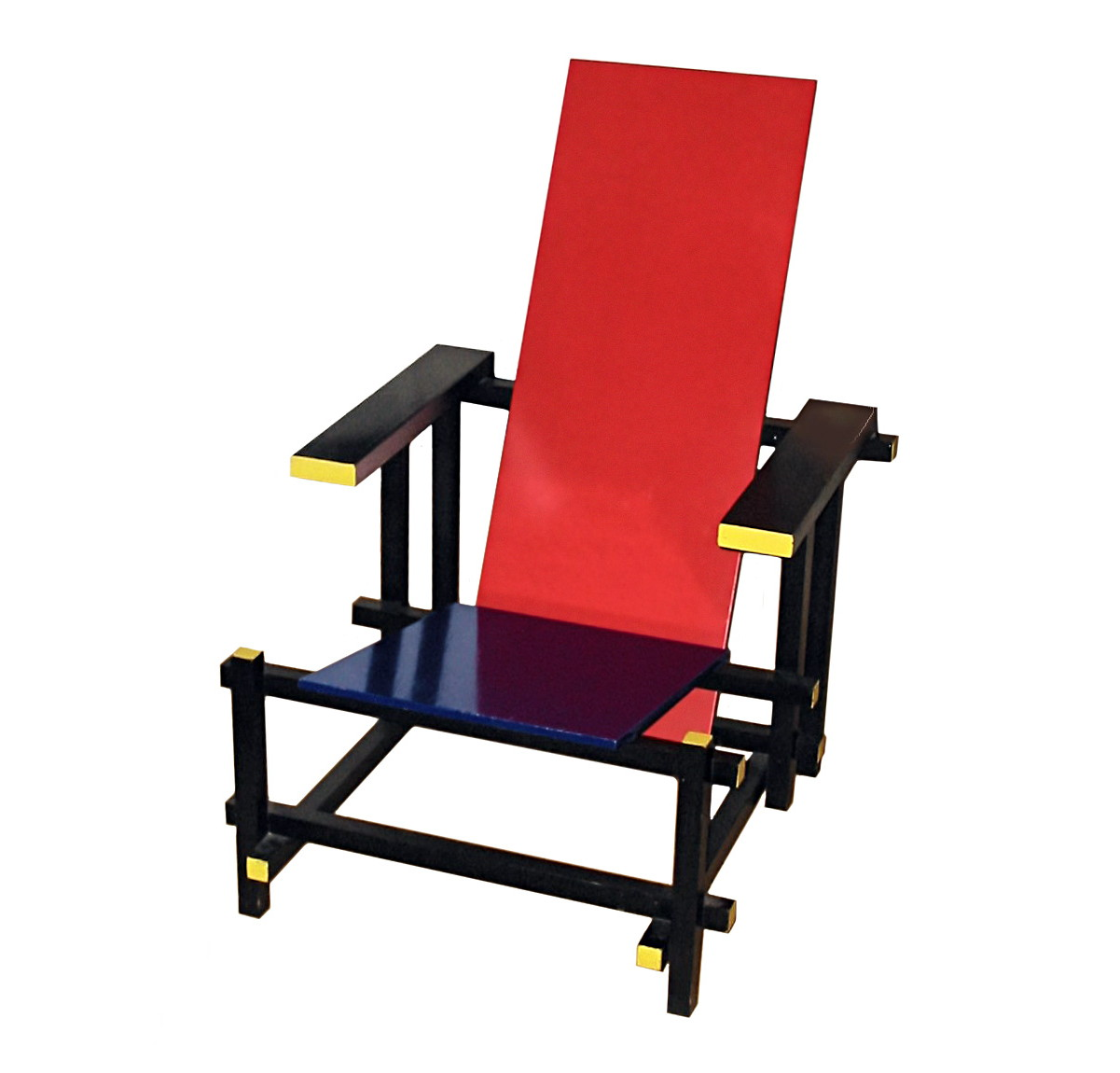 " Red Blue chair" designed by Gerrit Rietveld